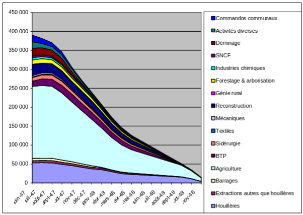 Source : Archives nationales contemporaines de Fontainebleau - Côte 770623/85, Tableau réalisés à partir des reports mensuels établis par le Ministère des forces armées, « Situation de la main-d’œuvre étrangère (Ministre des forcées armées) », Notes du 19/2/48, 17/3/48, 1/4/48, 25/11/48, 14/10/48, 25/9/47, 22/7/47. Précision importante, le tableau ne fait pas figurer les PG inactifs (ceux, entre autres, jugés inaptes stationnés en dépôt, ceux en transit vers un nouvel employeur, ceux en instance de libération ou de transformation de travailleur libre)